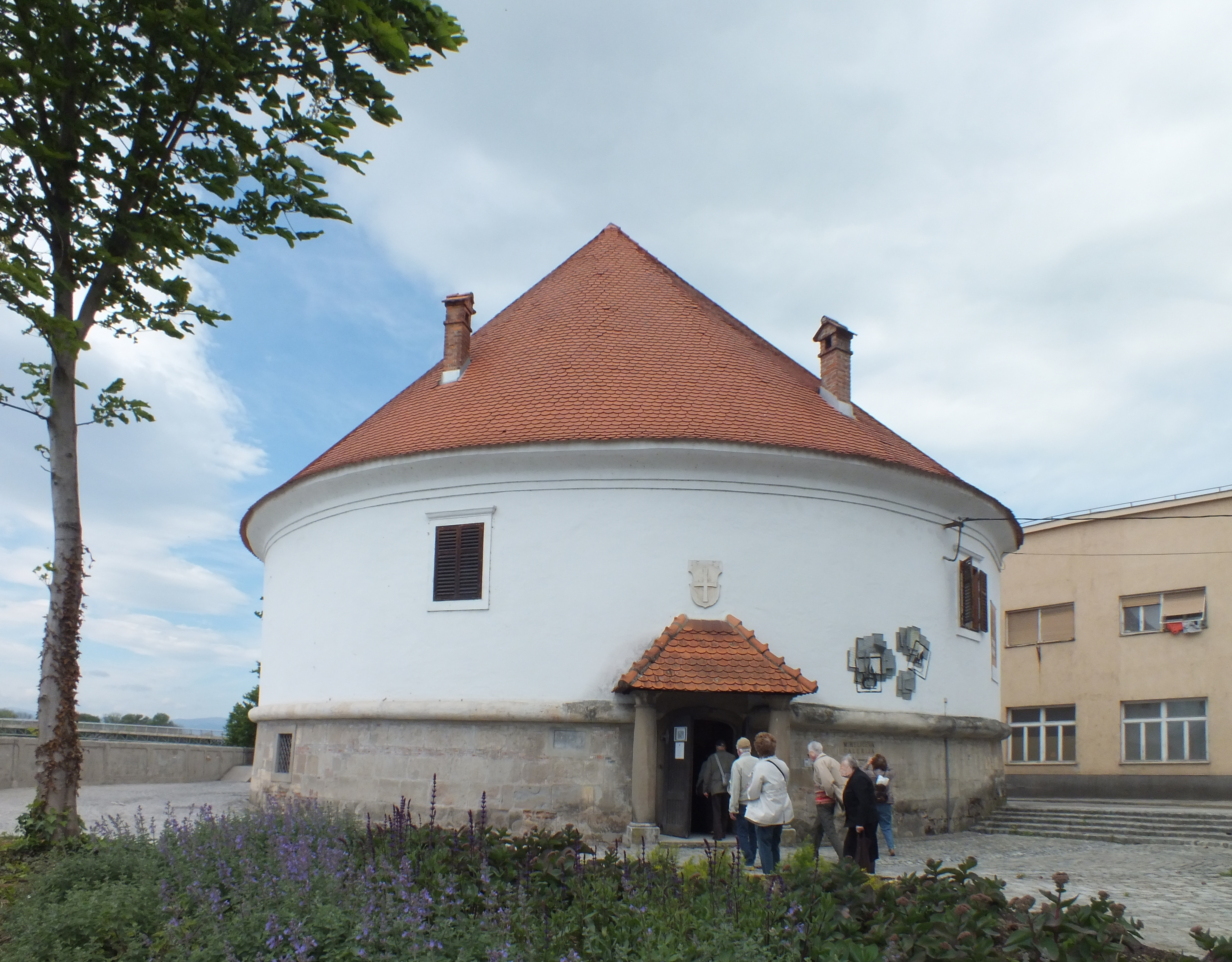 Ptuj, SLO; Kunstgalerie Mihelic